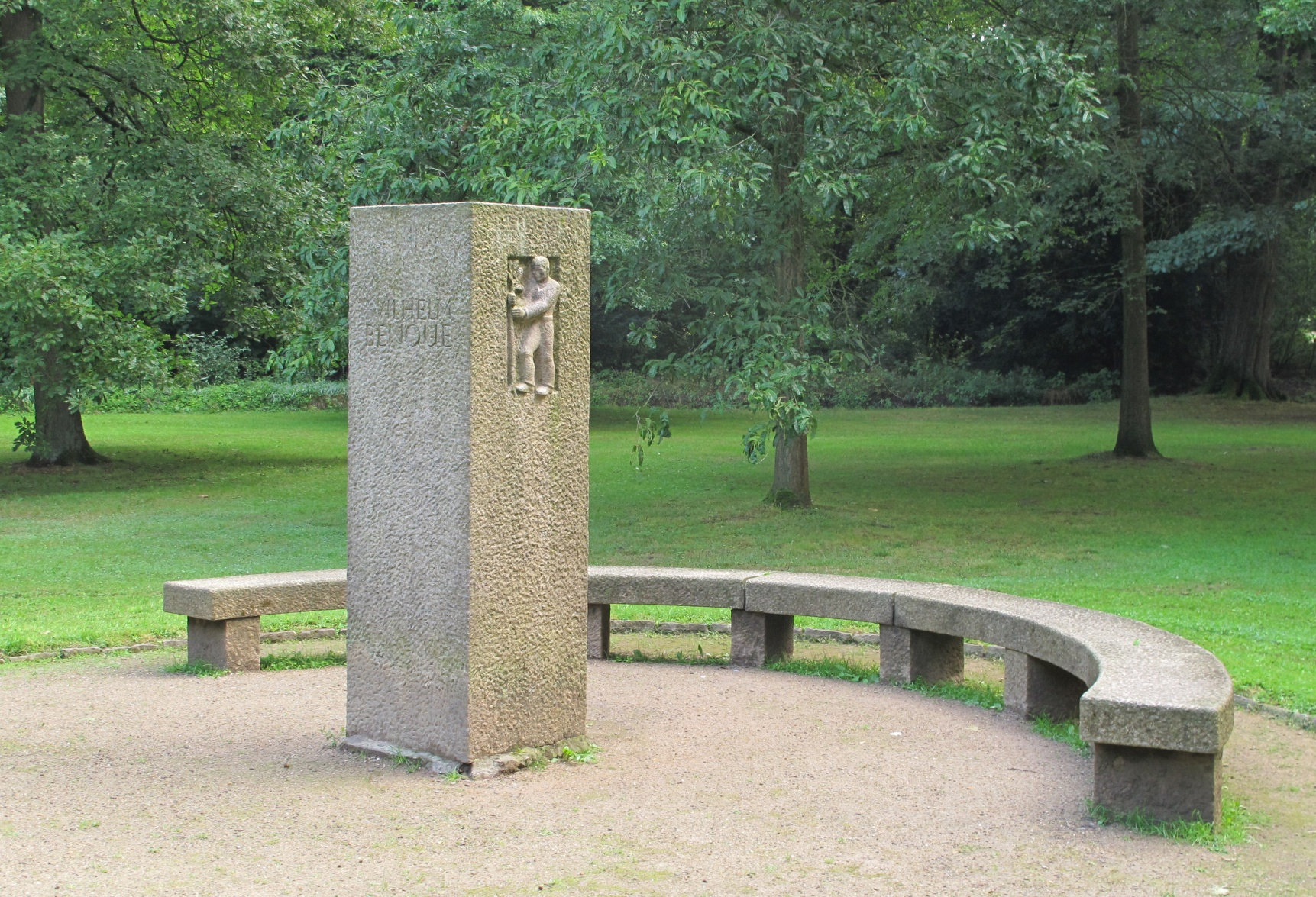 Benquestein in Bremen,Das abgebildete Objekt ist ein geschütztes Kulturdenkmal in der Freien Hansestadt Bremen, mit der Nr. 0218,T025 beim Landesamt für Denkmalpflege registriert.